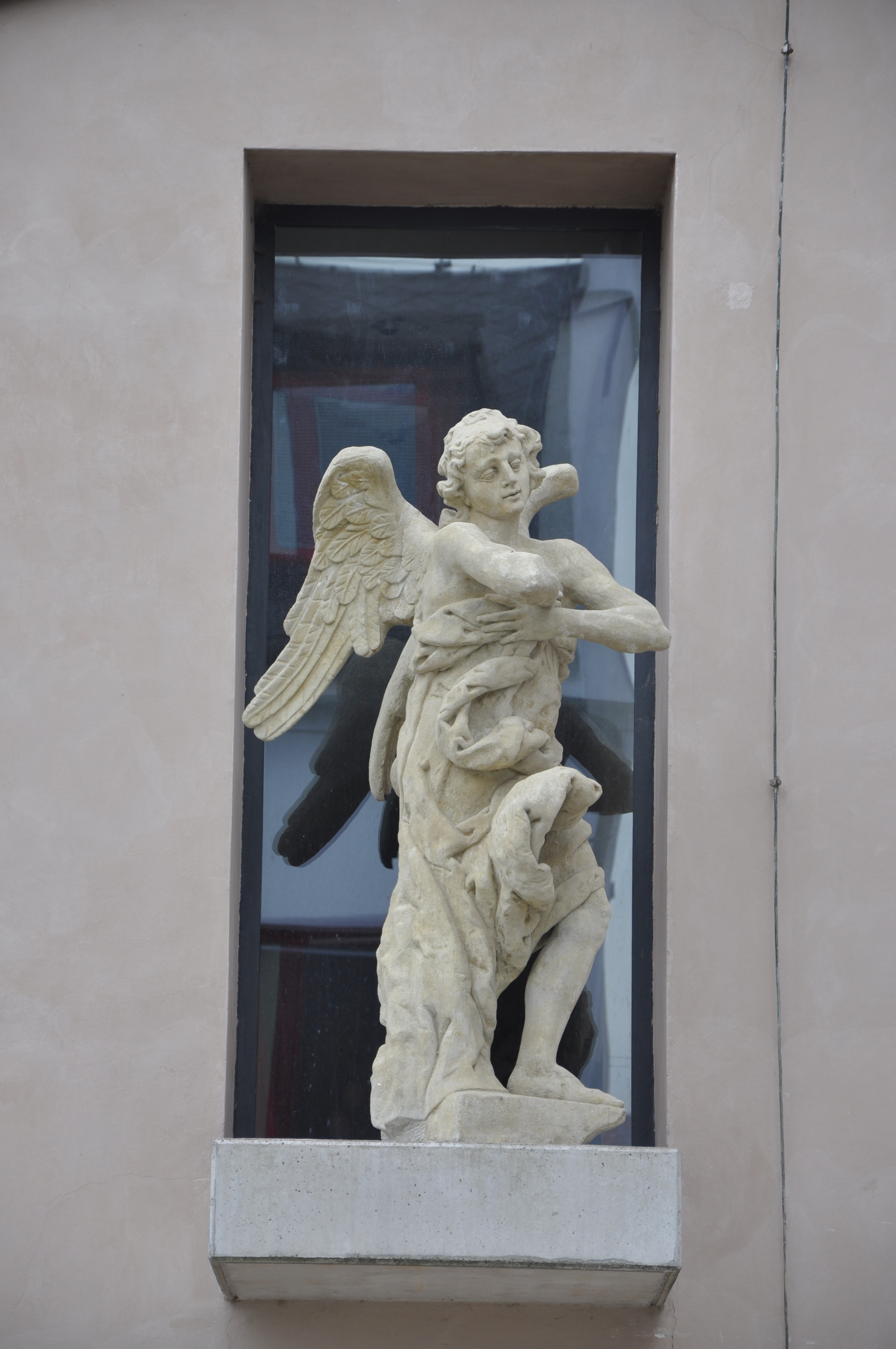 Muzeum barokních soch v hrudimi - socha anděla, kopie díla barokního sochaře Severina Tischlera z Kalvárie u Moravské Třebové.